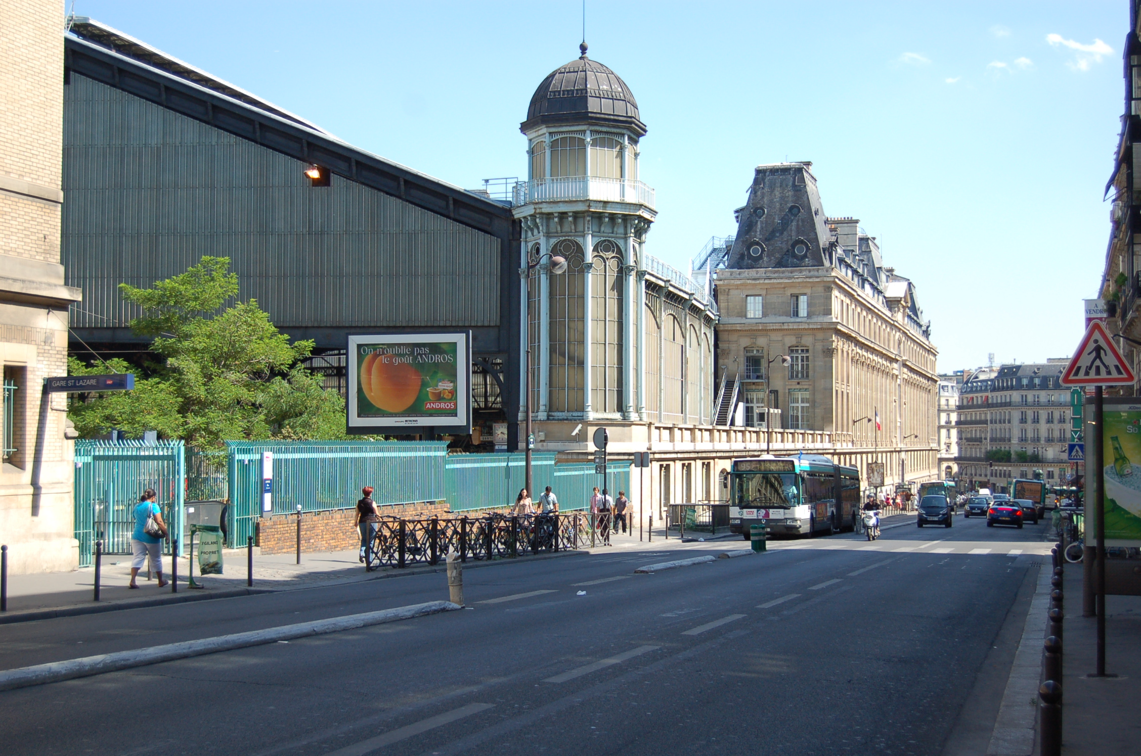 Gare Saint Lazare côtés rue de Rome